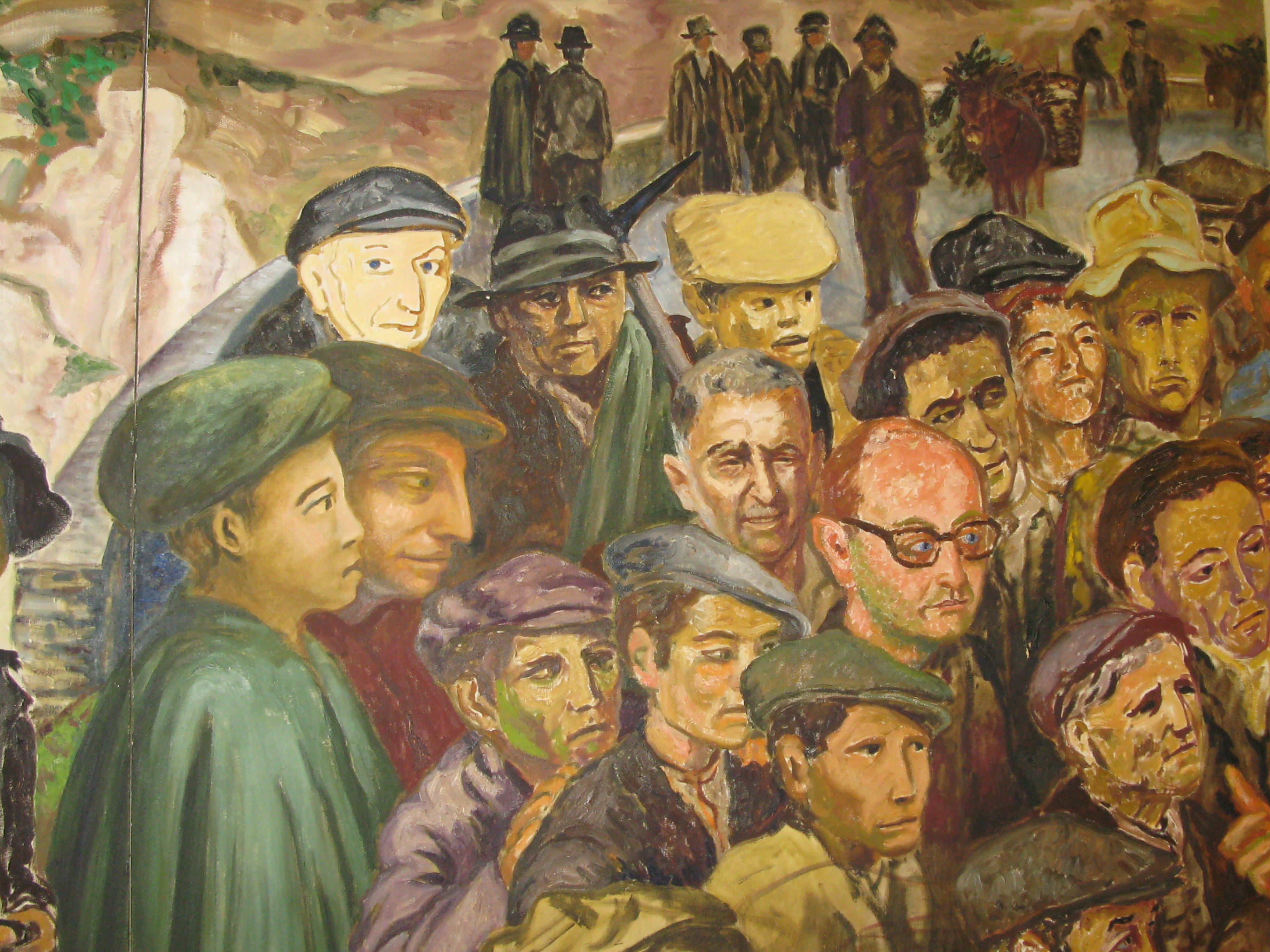 Lucania